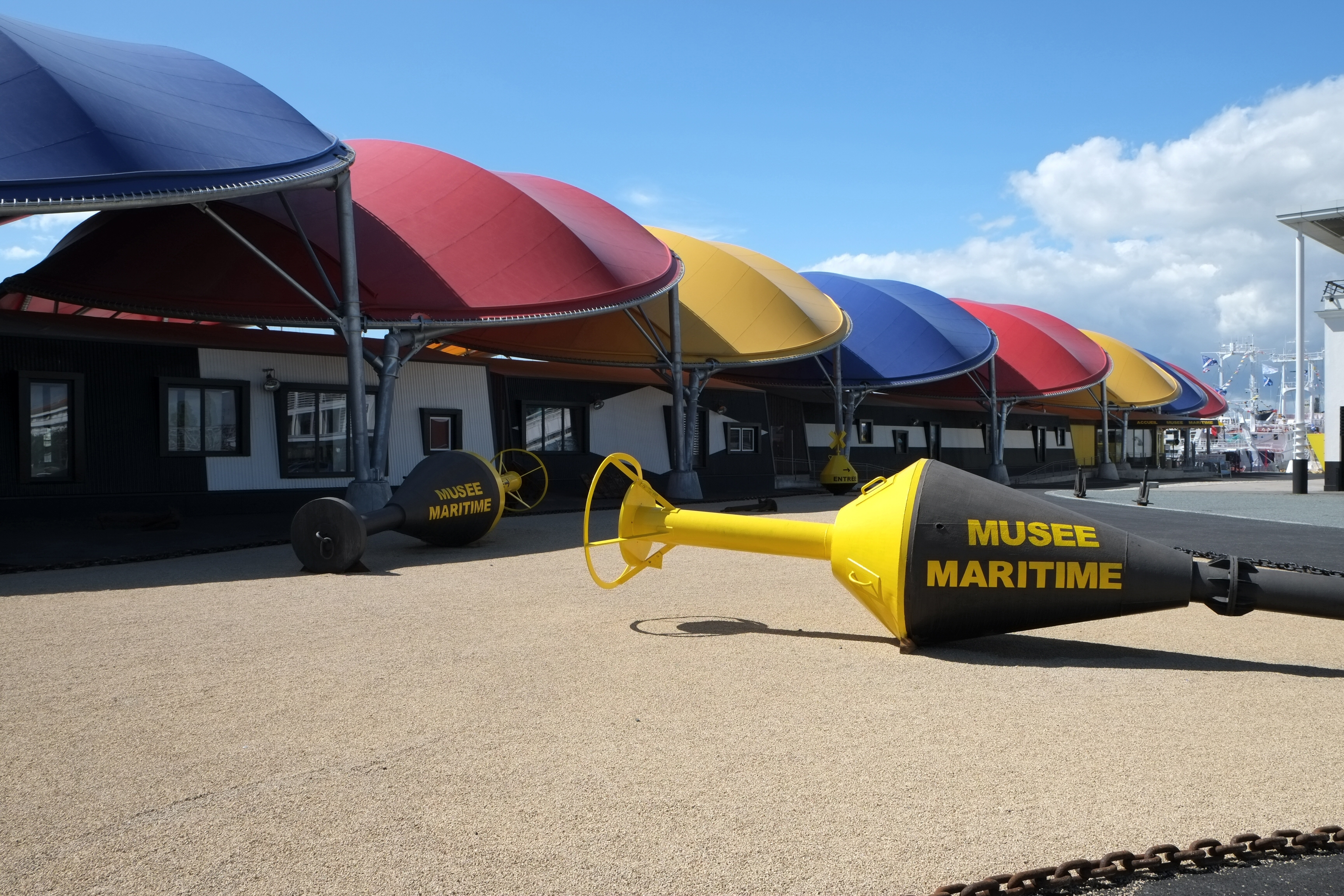 Musée Maritime de La Rochelle Charente-Maritime France